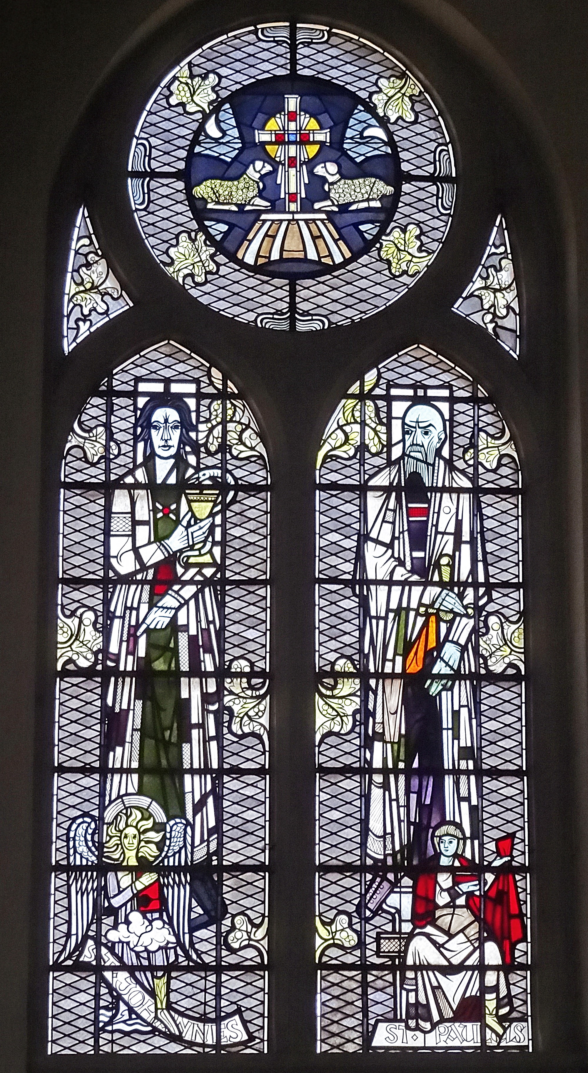 Ostfenster II von Karl Völker in der Thomaskirche zu Erfurt